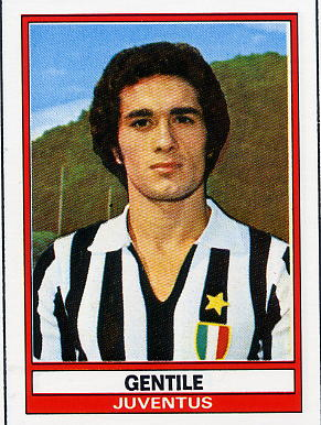 Claudio Gentile che indossa la maglia del Juventus